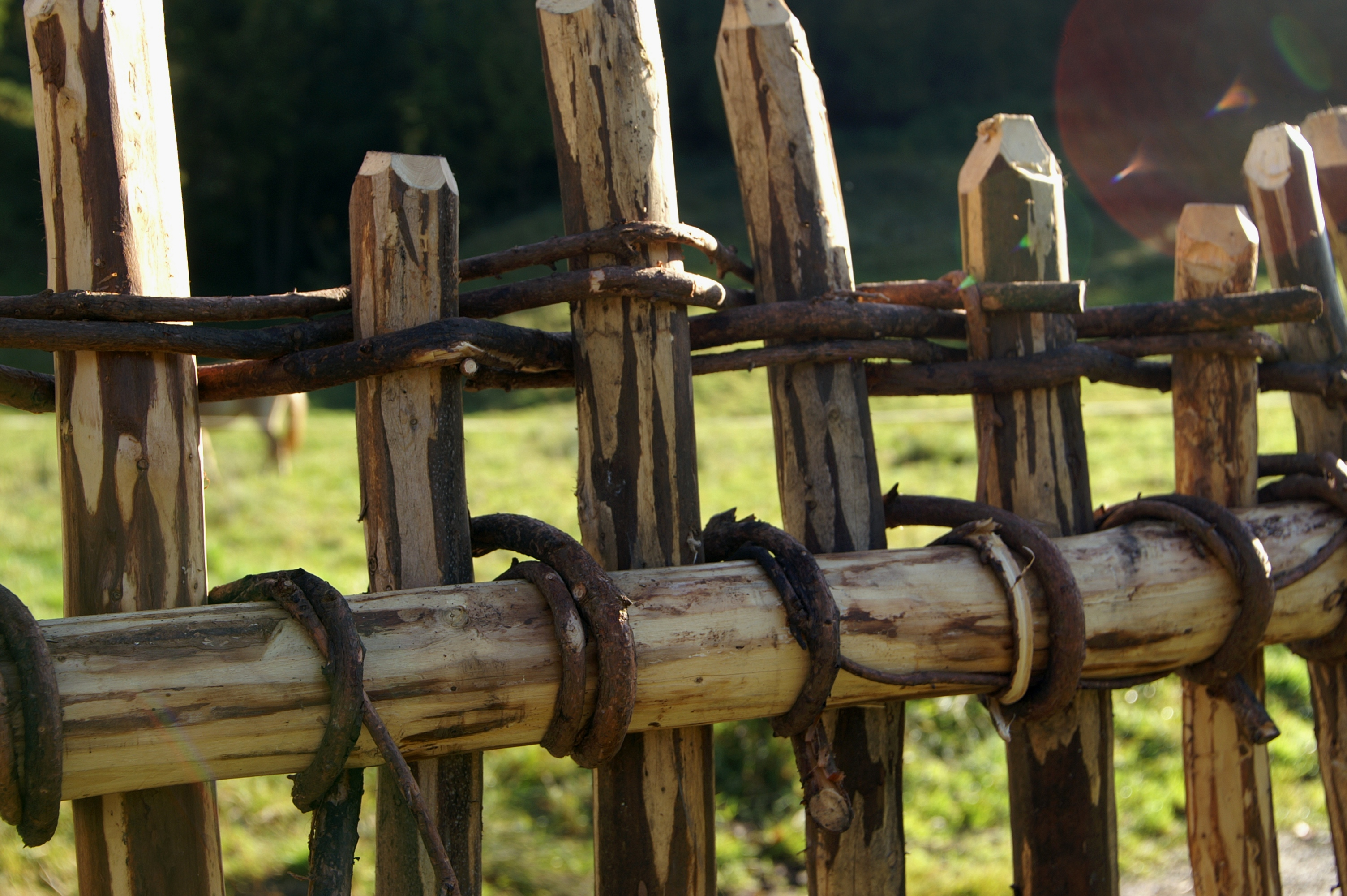 Speltenzaun mit einfacher Flechtung auf dem Holdamoos in Schoppernau